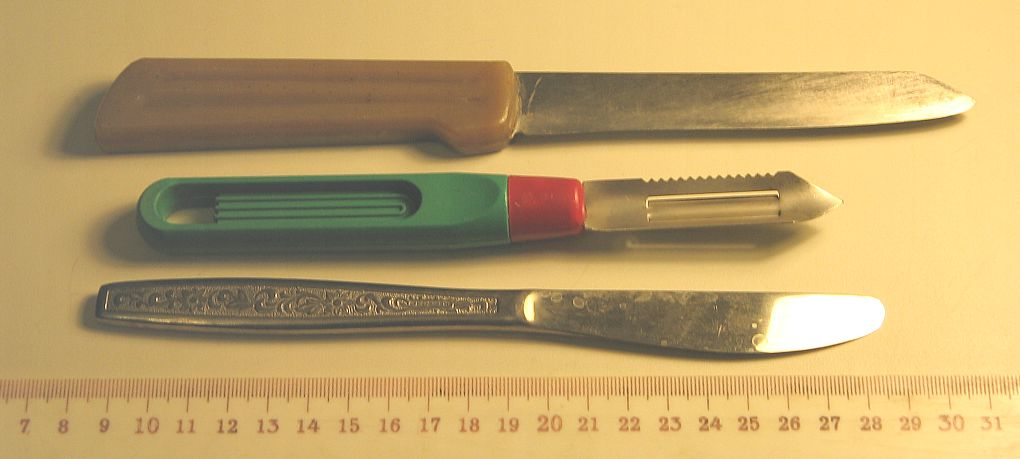 Tranĉiloj por manĝaĵoj. De supre malsupren: ĝenerala tranĉilo por kuiri, speciala tranĉilo por disŝeligi terpomojn, tranĉilo por manĝi (ĝi estas manĝilo). Mi, aŭtoro de la bildo, permesas al ĉiuj uzi ĝin kun ĉi tiaj kondiĉoj